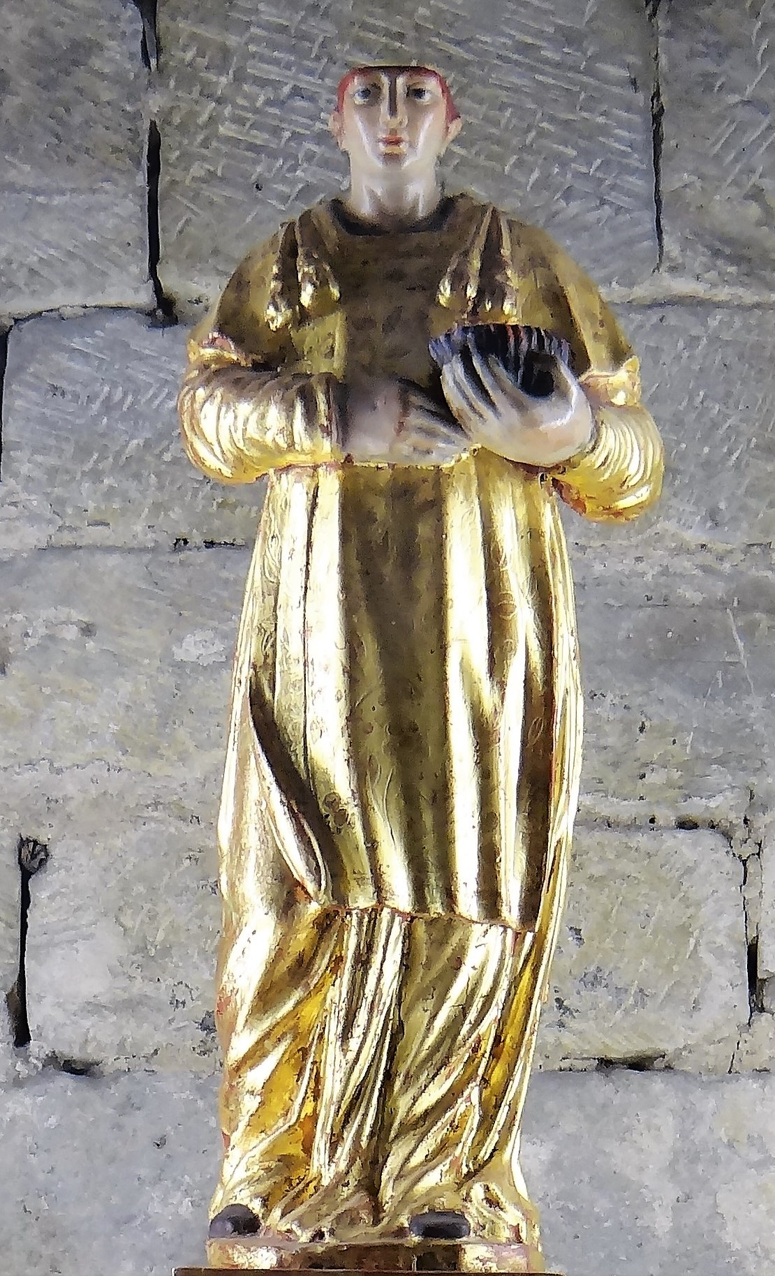 Abbaye de Saint-Papoul - Statuette reliquaire de saint Papoul en bois du 18e siècle. Il porte sur sa calotte crânienne sur sa main rappelant son martyre.